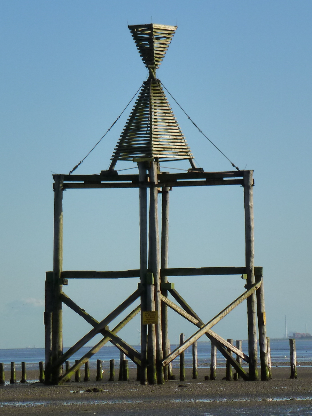 Denkmalgeschützte Ostbake Wangerooge